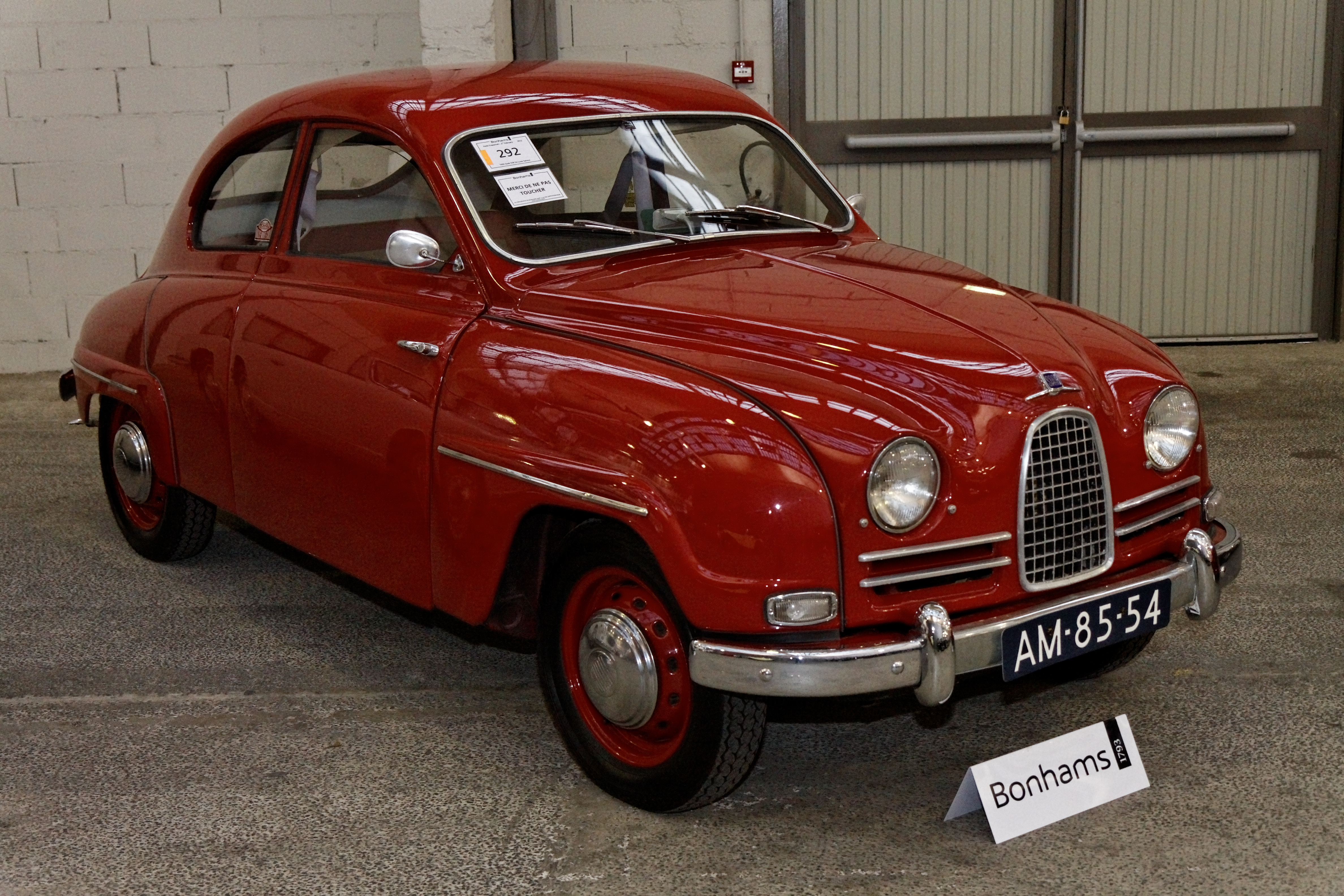 SAAB 93B De Luxe Saloon